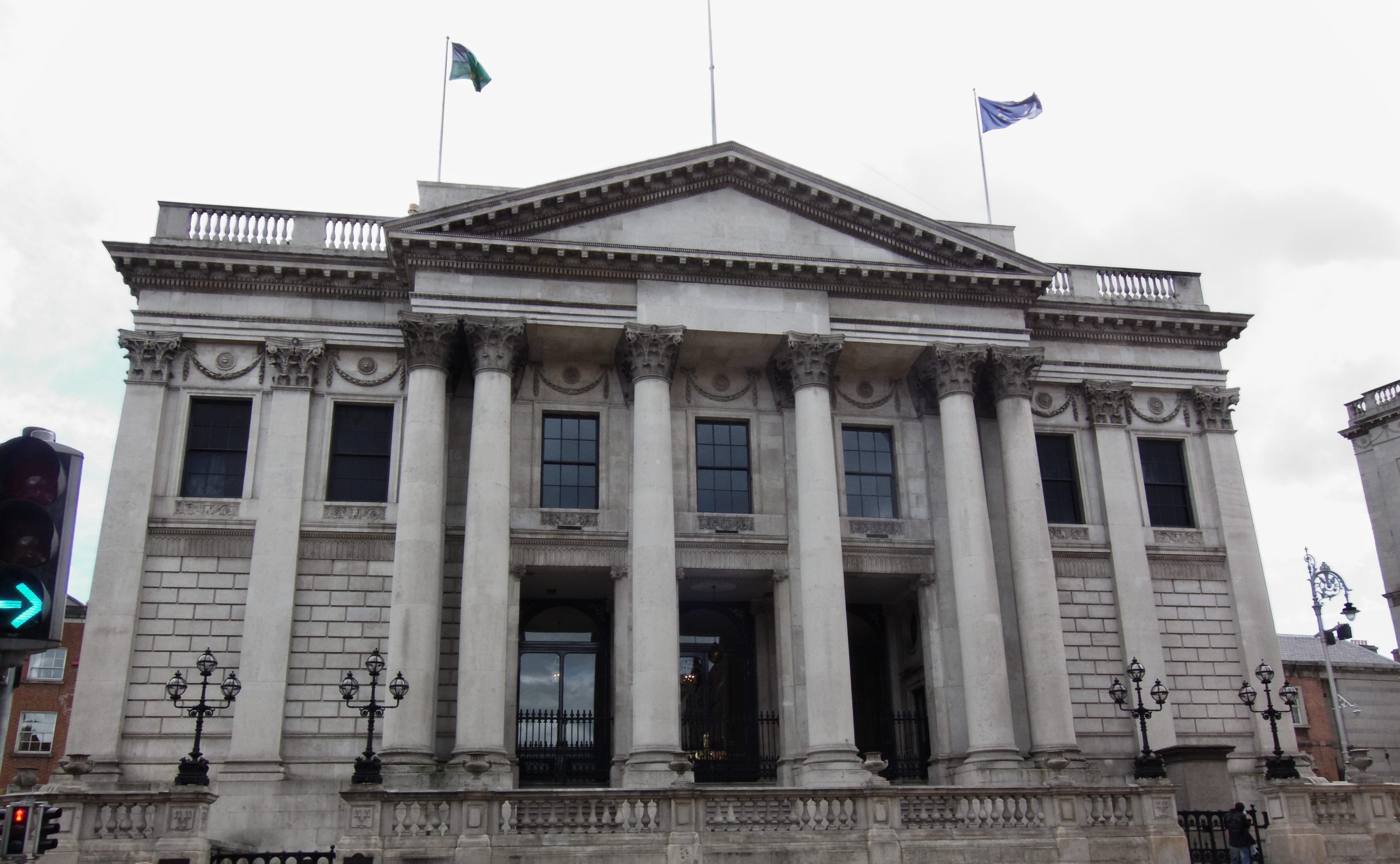 Palacio municipal de Dublín, Irlanda.